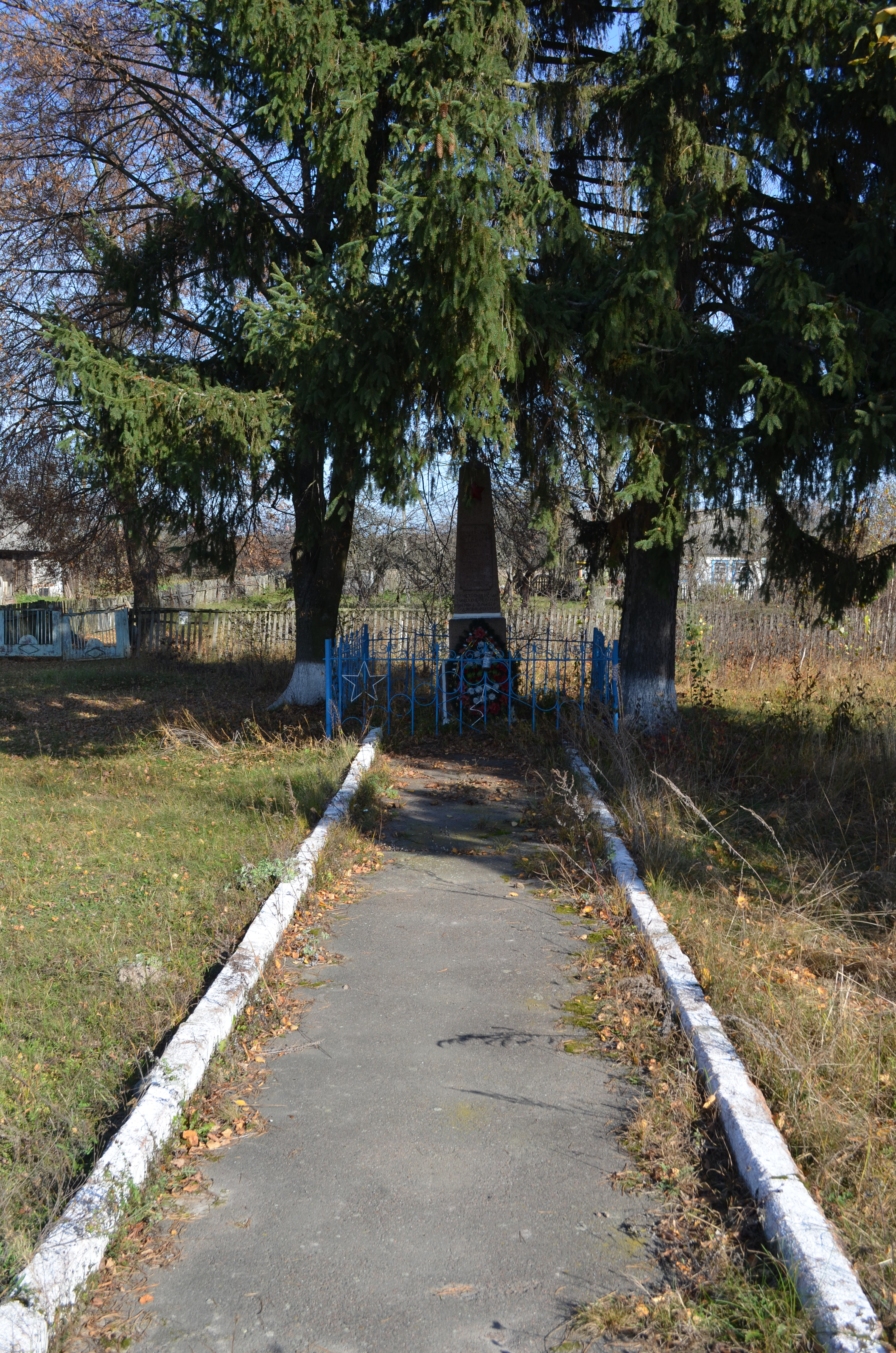 Братська могила радянських воїнів. Кількість похованих невідома, Коростенський район, с. Жупанівка, Горщиківська с/р, в центрі села